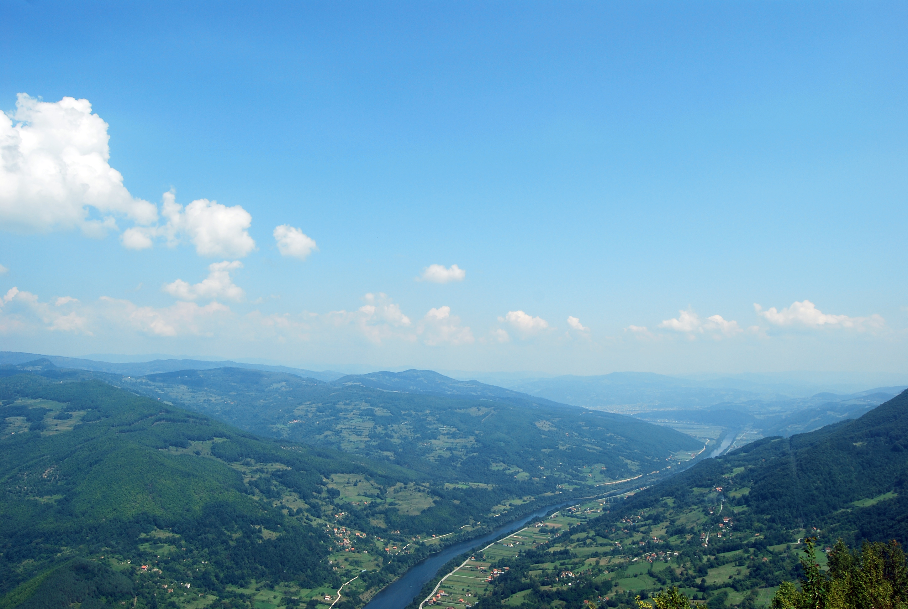 Drina valley